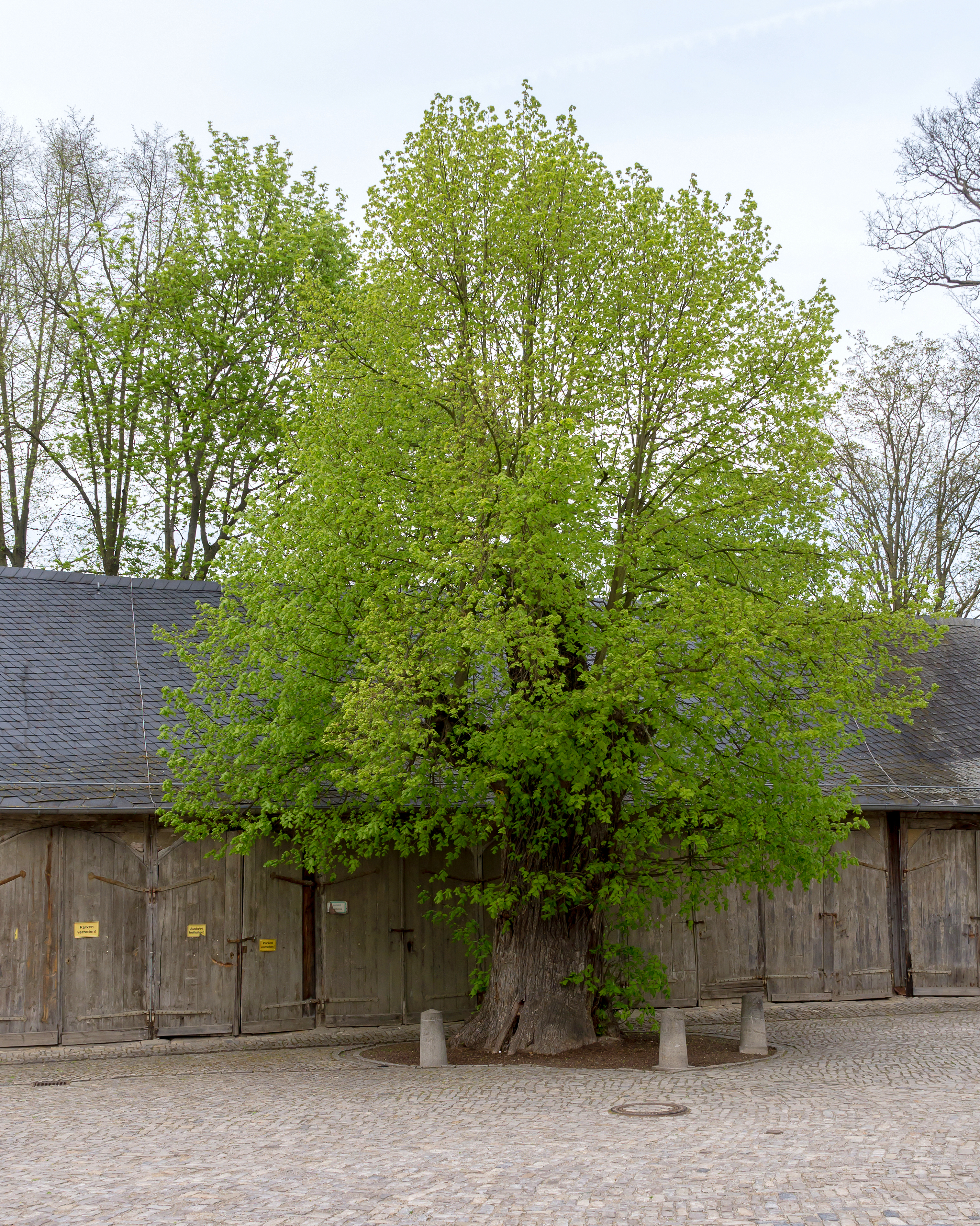 Schloss-Linde (Heidecksburg) III Naturdenkmal DE-TH